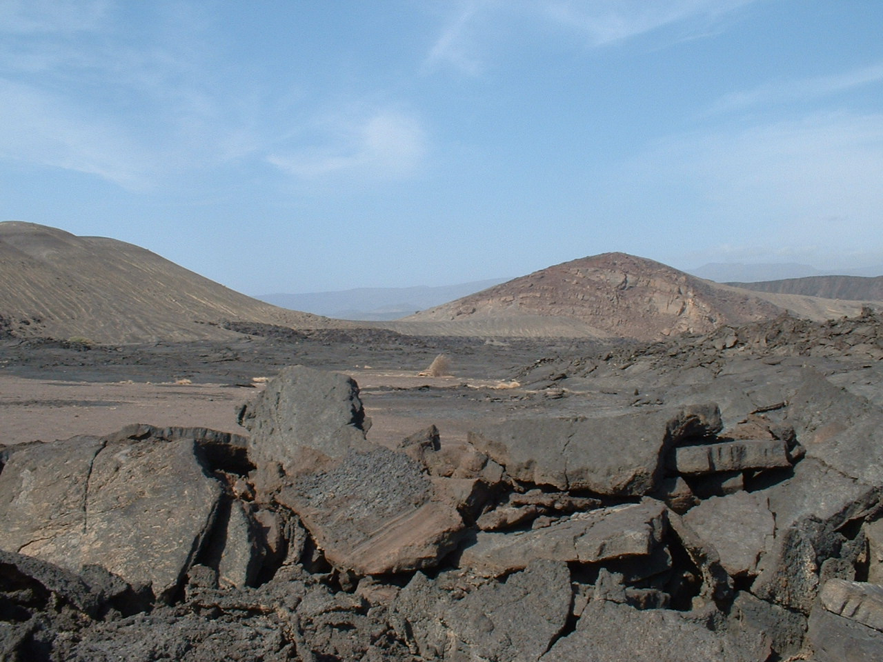 Ardoukoba volcano, Djibouti